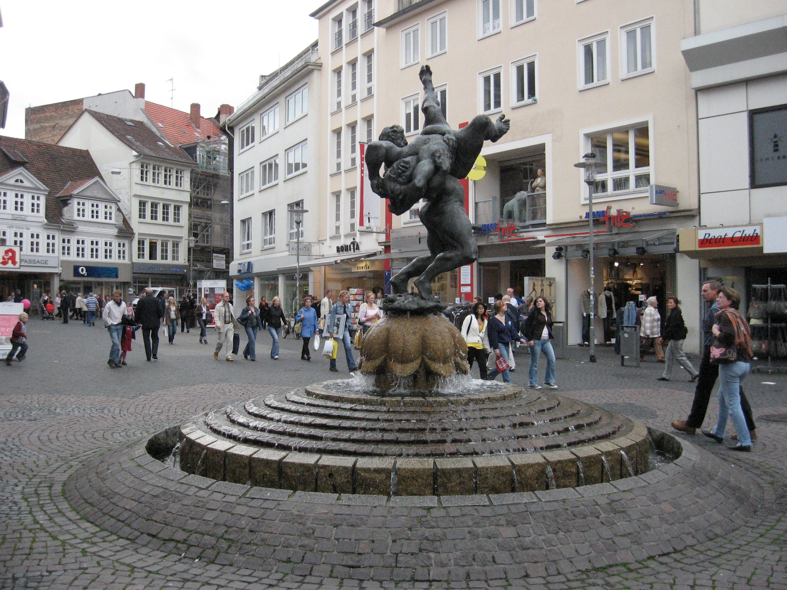 Der Ringerbrunnen in der Fußgängerzone in Braunschweig wurde 1975 von Bildhauer Jürgen Weber geschaffen.